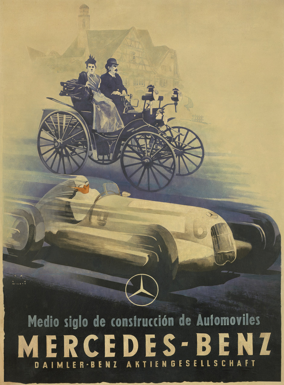 Mercedes-Benz. Medio siglo de construcción de Automoviles. Farboffset. 116 x 84 cm. (Berlin, M. Müller & Sohn KG, 1935).e.